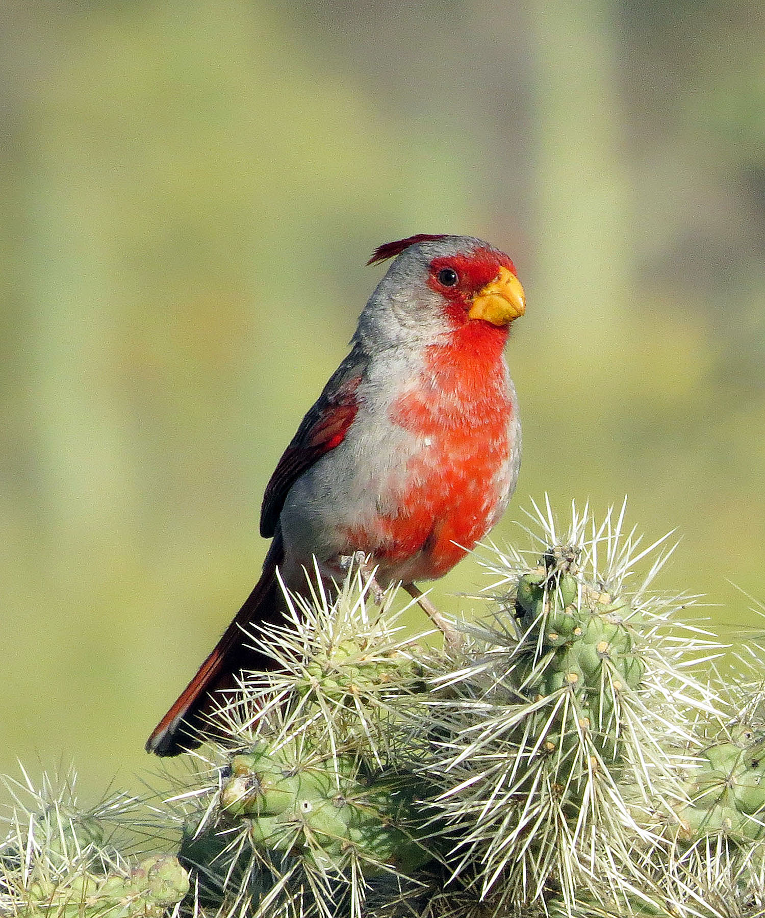 Cardinalis sinuatus sinuatus 8 may 15 Tucson Mt. Park, Az